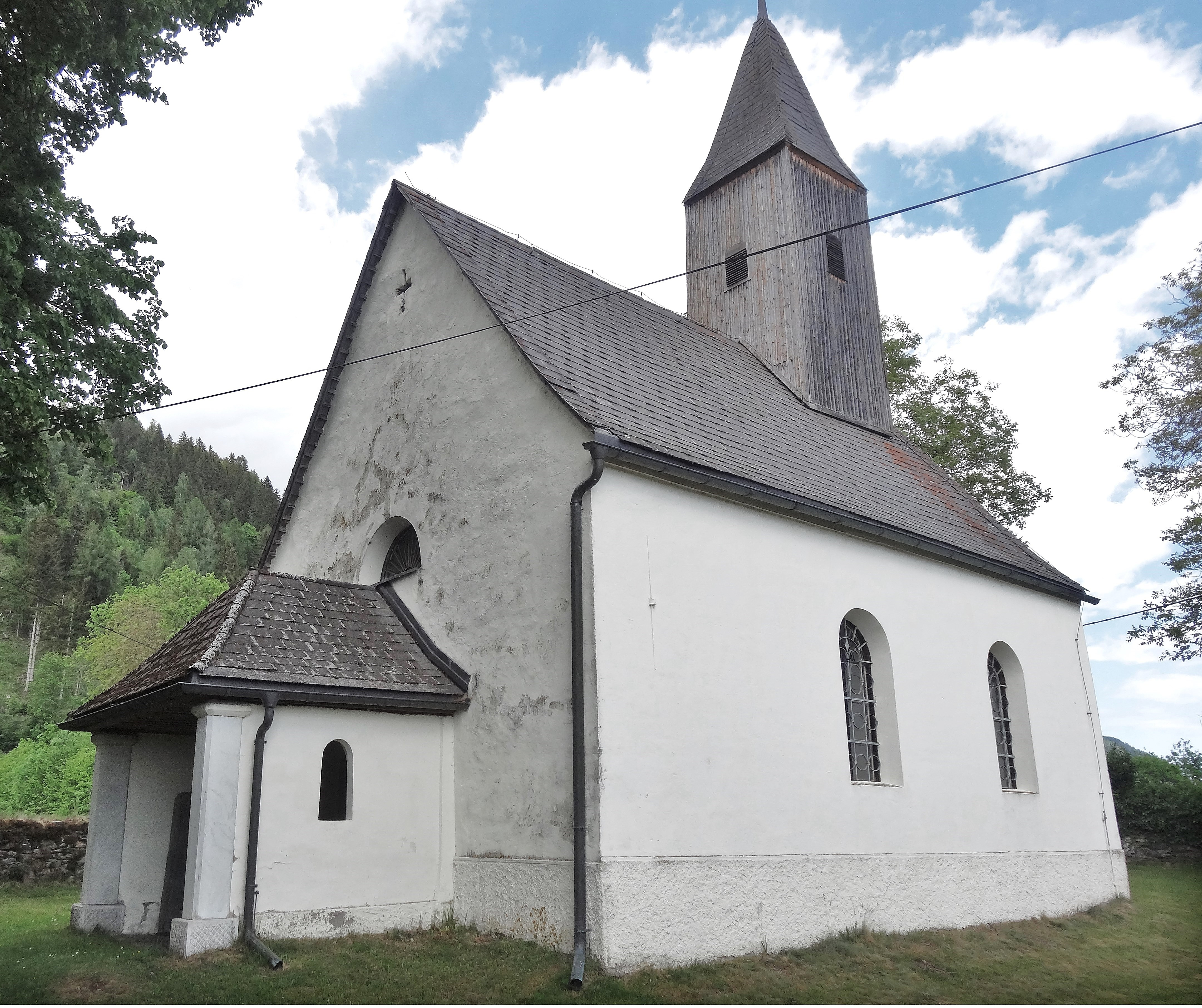 Kath. Filialkirche hl. Petrus in Kleingradenegg (St. Urban), Ansicht von Südwesten